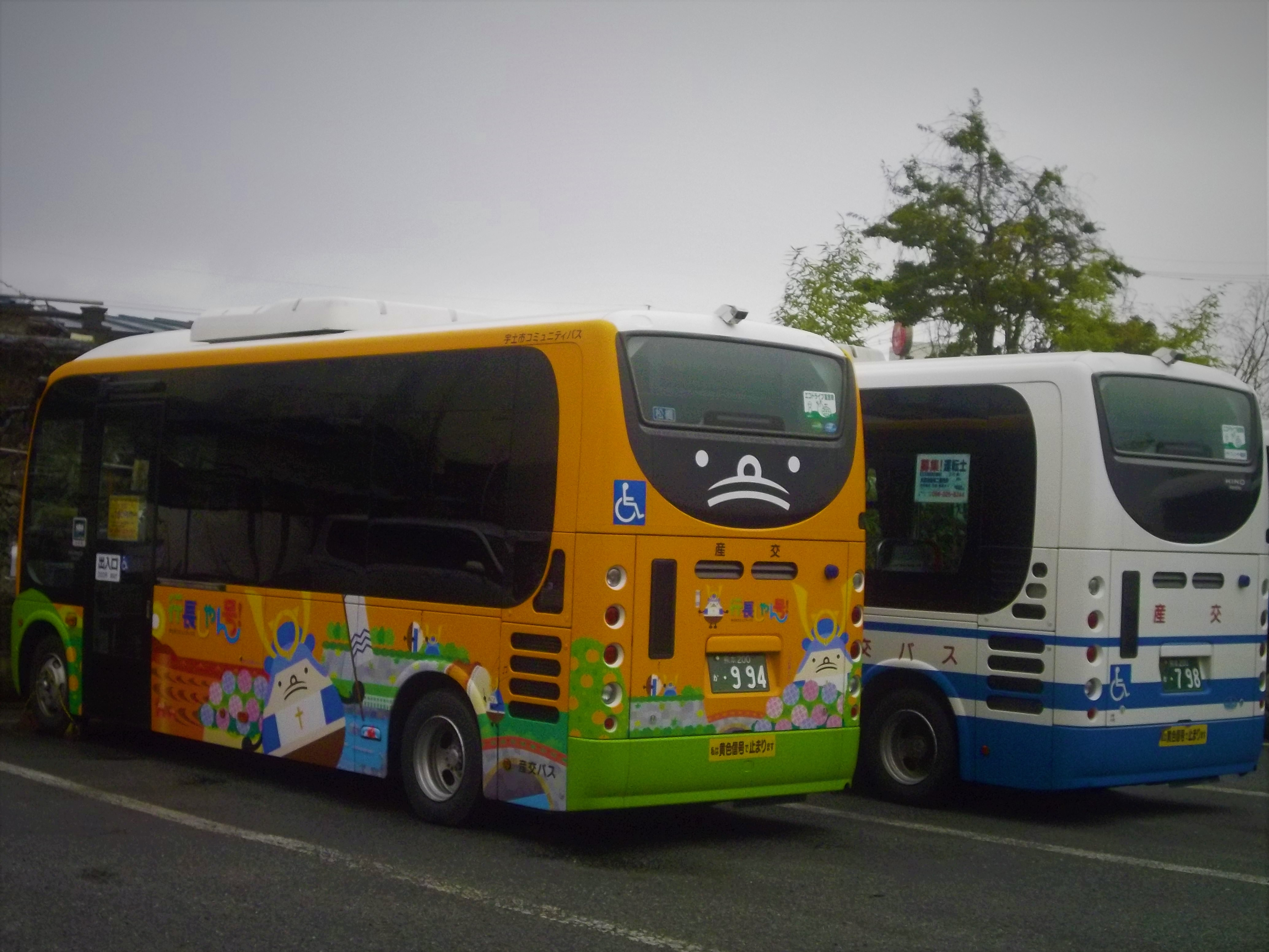 日曜日の松橋営業所に佇む産交バス「行長しゃん号」専用車の日野・ポンチョ（No.994）